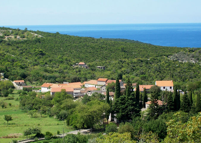 Радованићи, засеок Луштице, Васо Стањевић